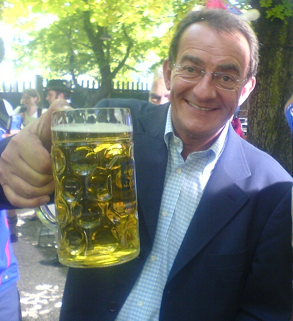 Jean-Pierre Pernaut dans un Biergarten à Munich lors de la coupe du monde de football 2006